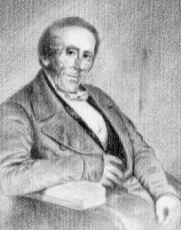 Bildbeschreibung: Carl Friedrich von Ledebour, Botaniker Fotograf/Zeichner: unbekannt Datum: 19. Jh. Sonstiges: ...